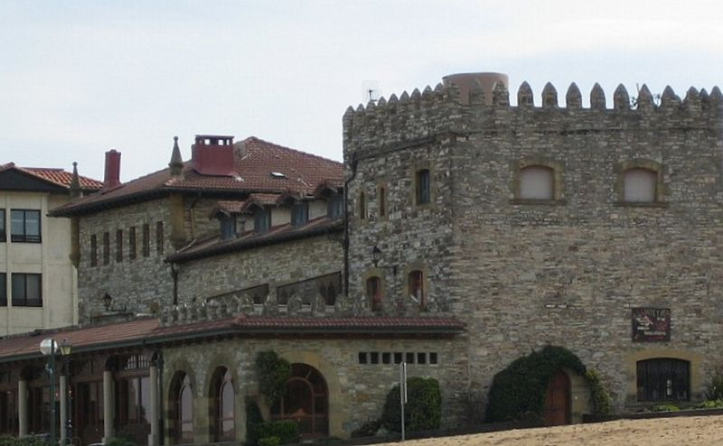 El restaurant de Karlos Arguiñano a Zarautz (Guipúscoa)